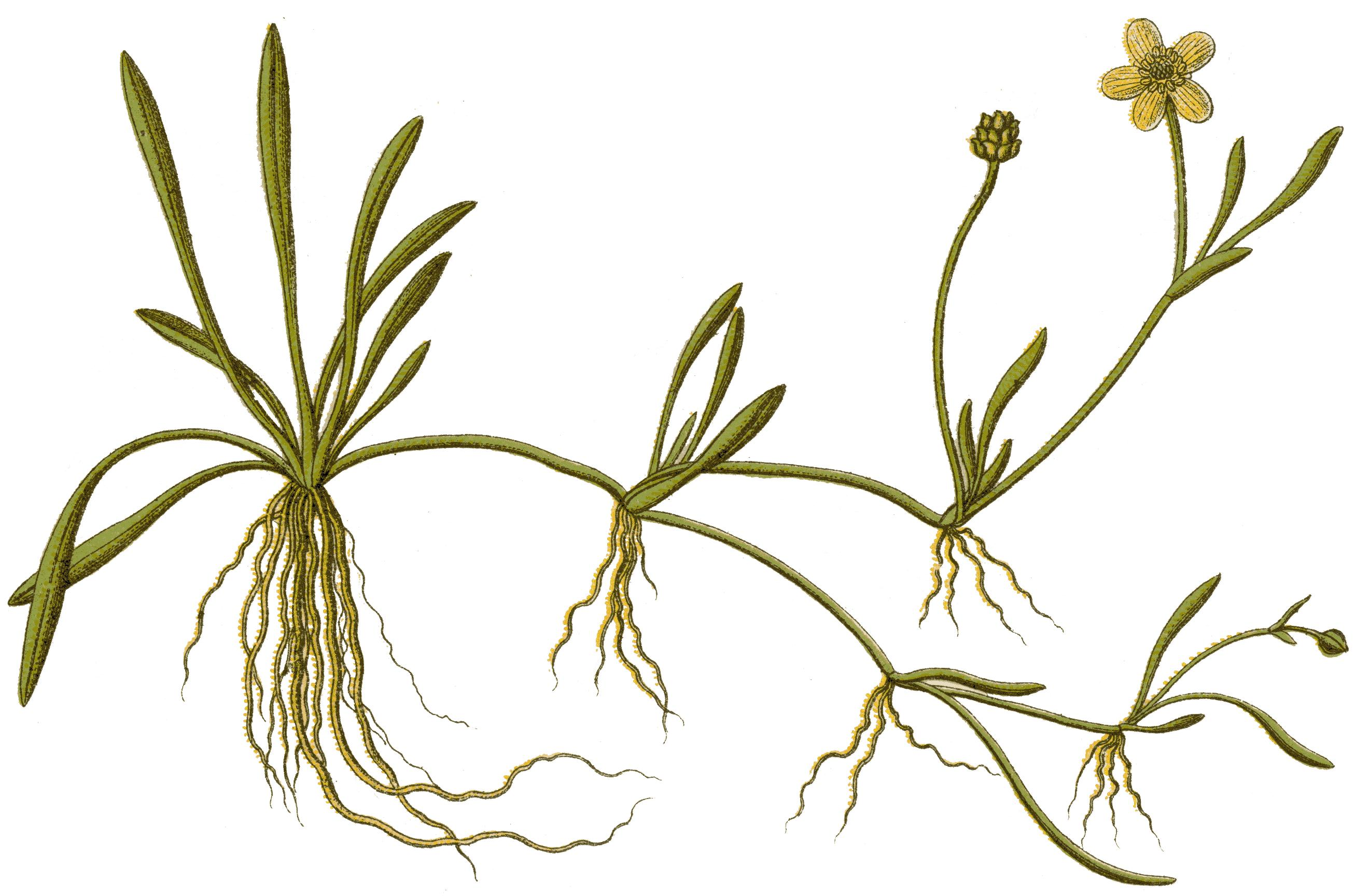 Ufer-Hahnenfuß, Ranunculus reptans L. : Ranunculus reptans L., syn. Ranunculus flammula var. reptans (L.) E. Mey. Original Description Kleine Sumpfranunkle (Uferform), Ranunculus flammula (reptans)